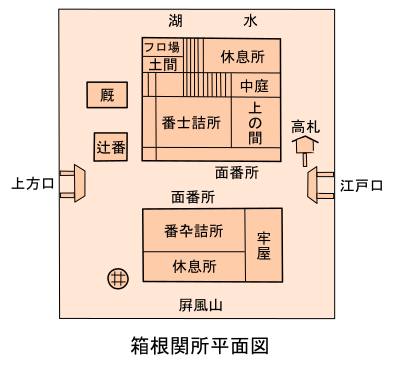 江戸時代、箱根関所の平面図。（大島延次郎（1995）『関所』、箱根関所平面図を参考に作成）